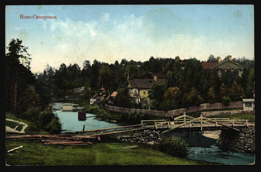 Ново-Сиверская